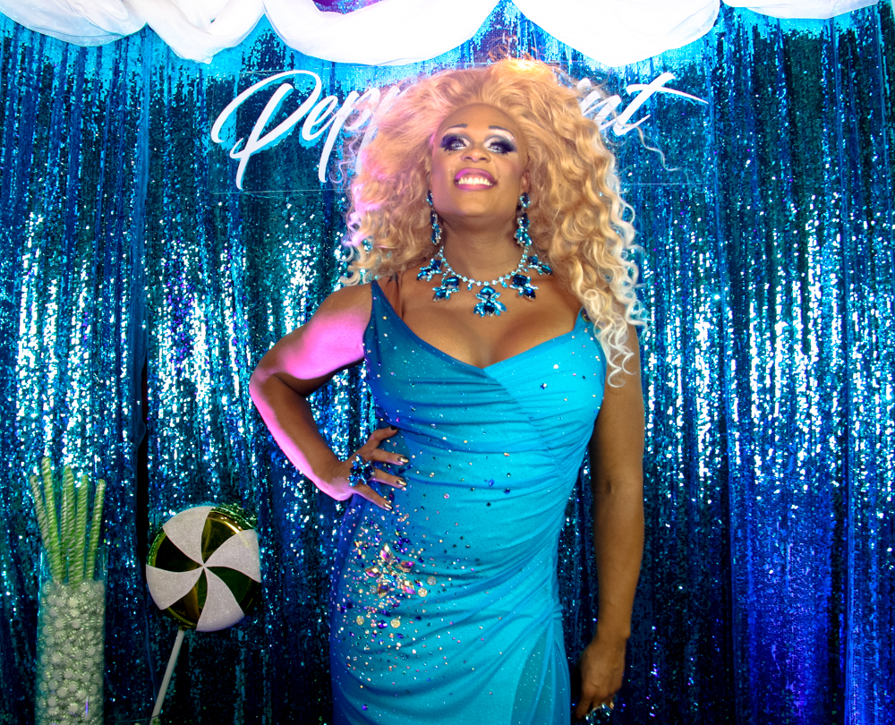 Peppermint at RuPauls Dragcon 2017